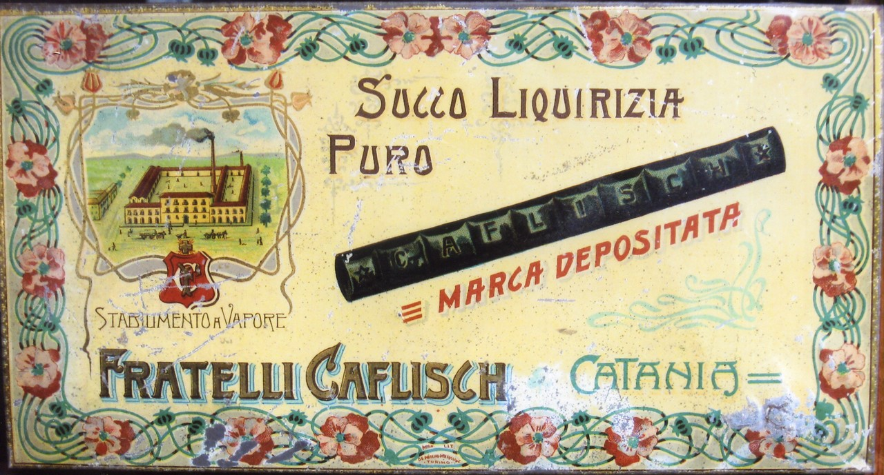 Coperchio della scatola di liquirizie Caflisch (AS Catania, Miscellanea imprenditori stranieri, s.d.)